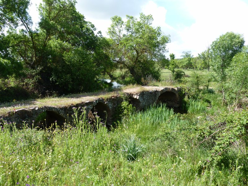 puente medieval sobre el arroyo Bracea.